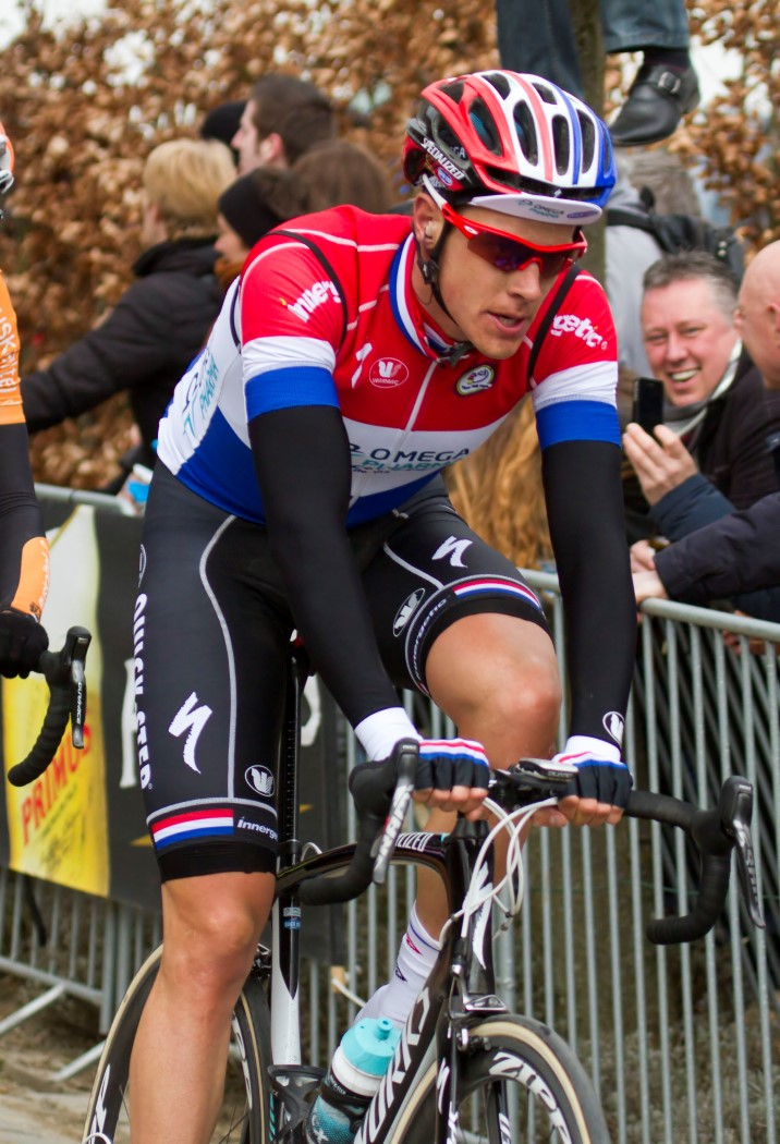 211 terpstra